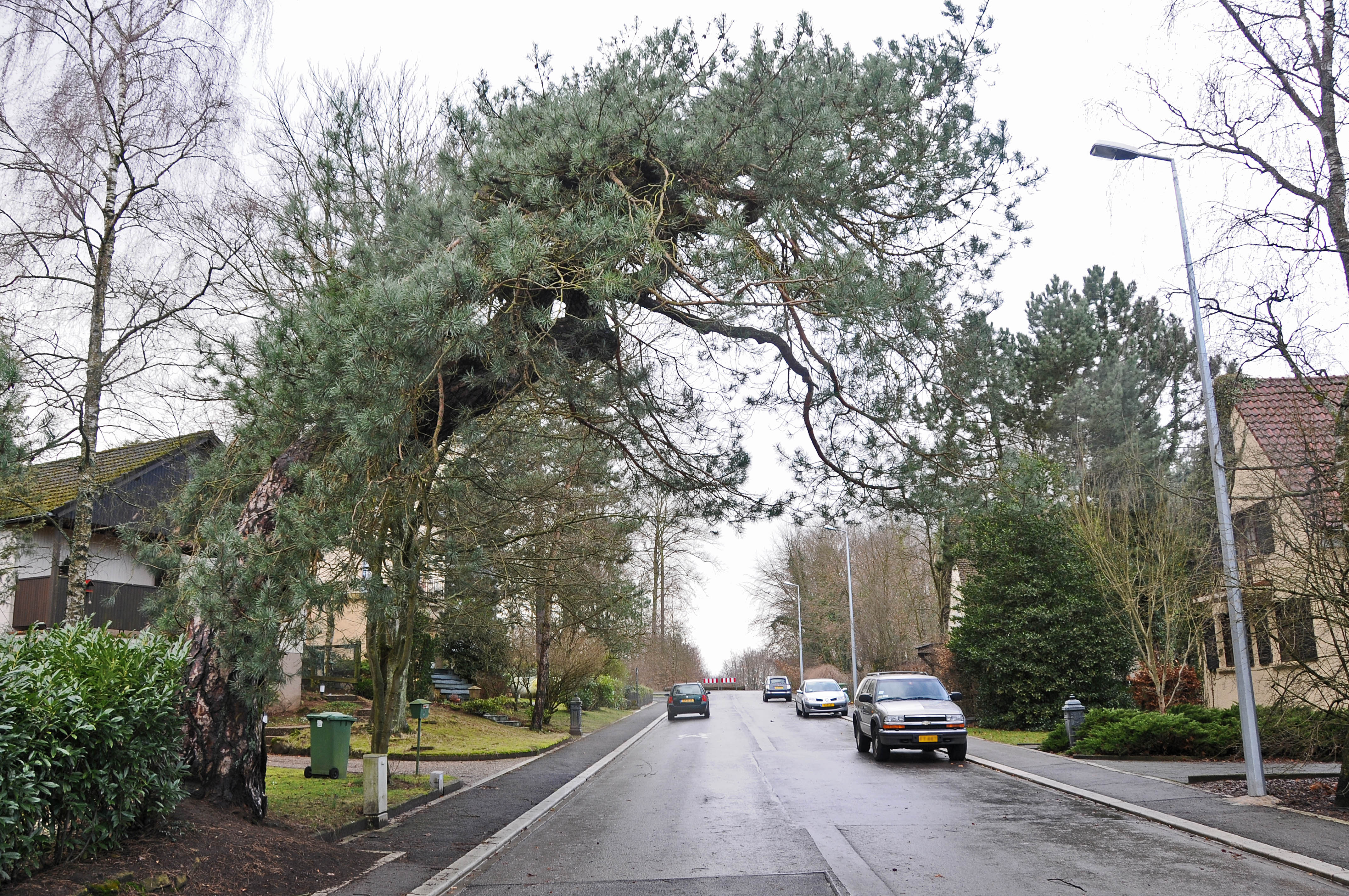 Kifer um Briddel.